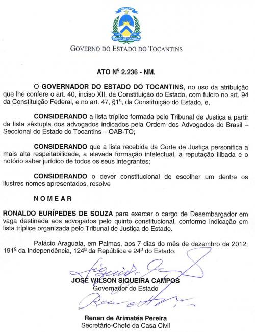 Ato do Governo do Estado do Tocantins de uma nomeação sob a regra do Quinto constitucional no Brasil.